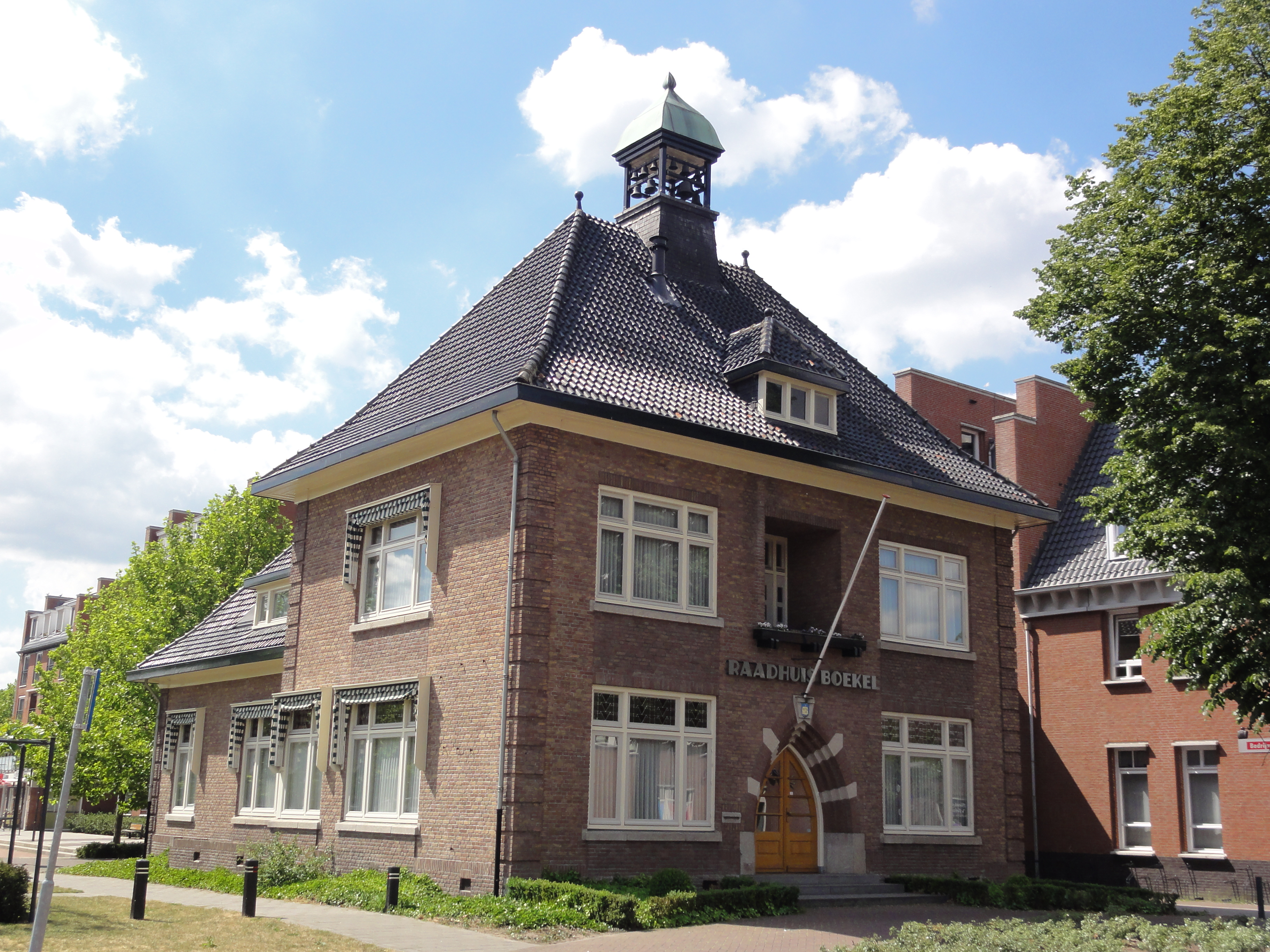 Boekel raadhuis